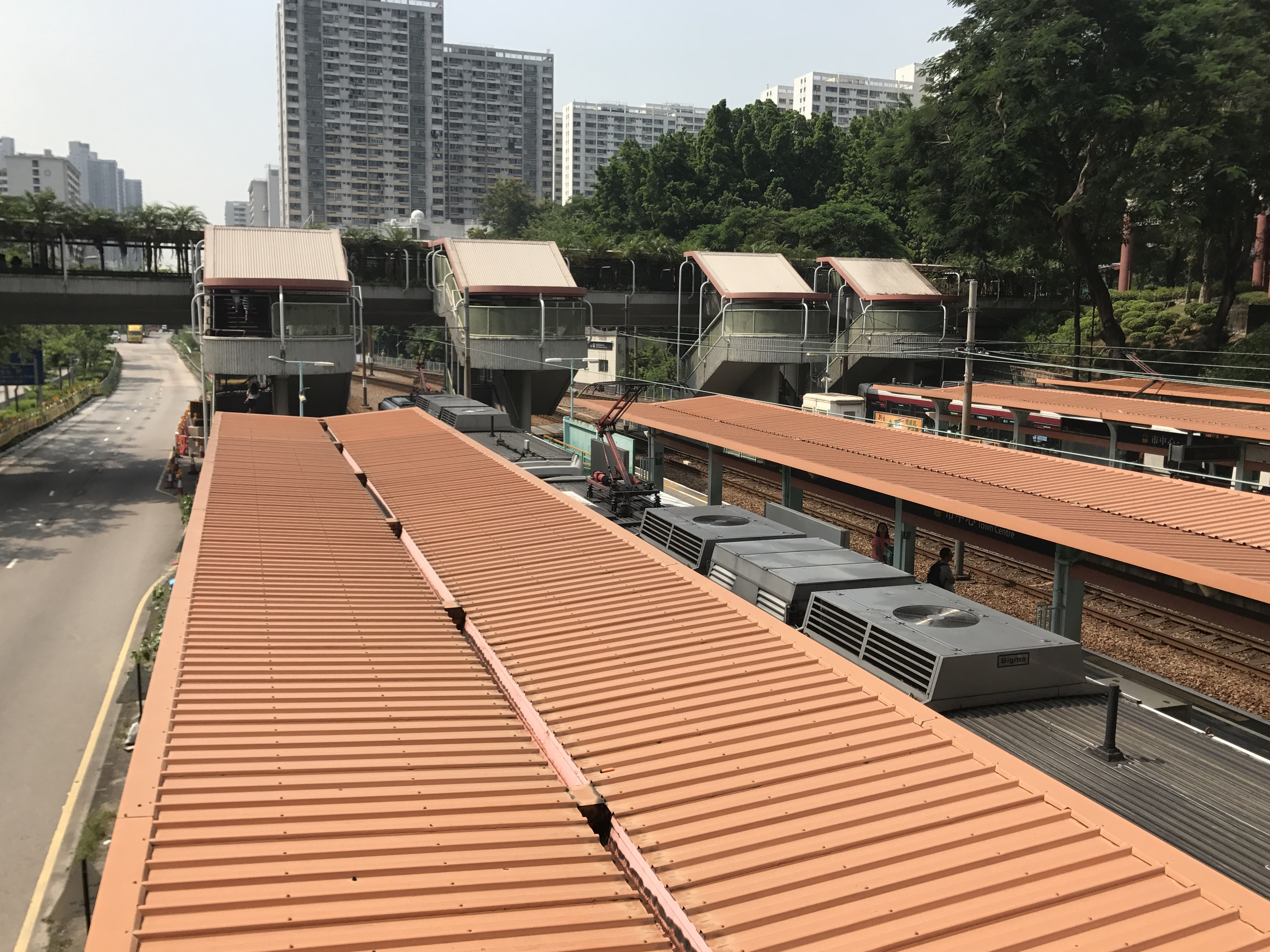 市中心駅の屋根